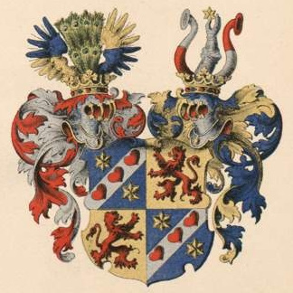 Bayeri suguvõsa aadlivapp.